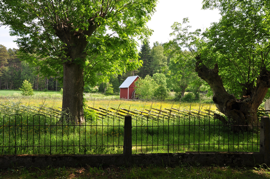 Fotot taget från gamla landsvägen med en askallé och i bakgrunden kvarnen.